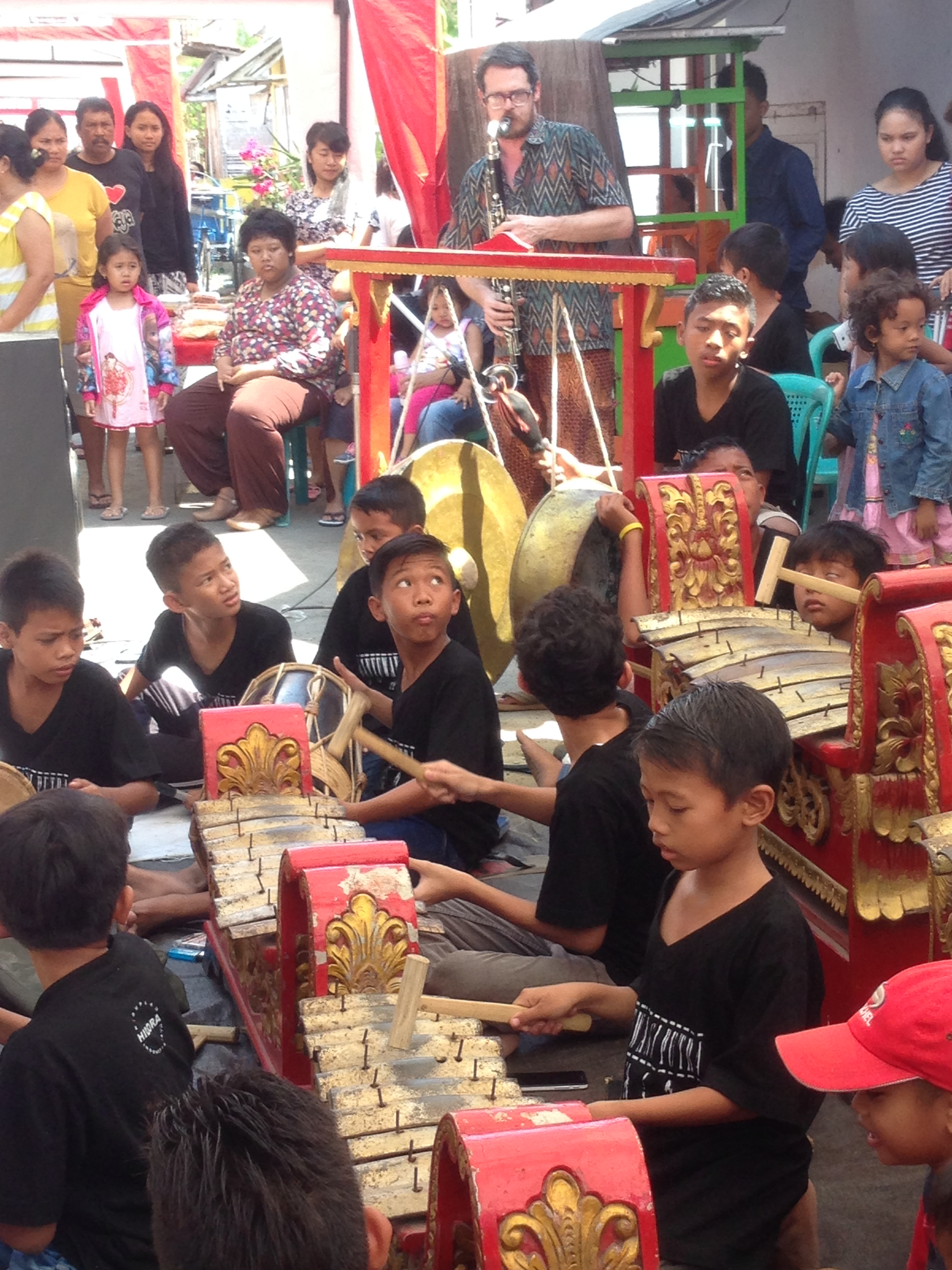 Grup Kesenian Banyuwangi Putra Junior, grup kesenian yang beranggotakan anak-anak TK, SD, dan SMP dari Kampung Temenggungan. Di kampung ini kesenian tumbuh subur, mulai dari anak-anak sampai orang tua rata-rata memiliki talenta kesenian yang bagus. Grup Banyuwangi Putra sendiri telah berdiri semenjak tahun 1977, dan Banyuwangi Putra Junior merupakan generasi yang keempat